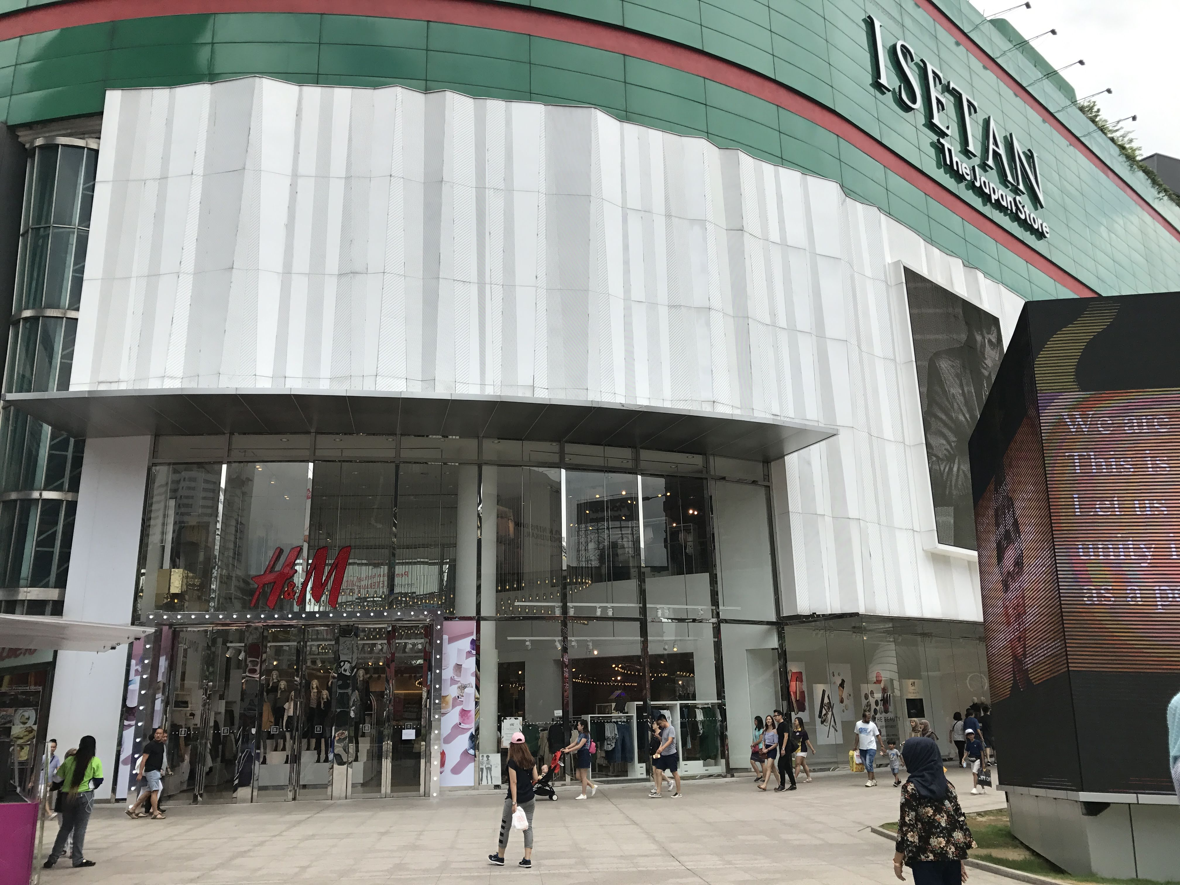 吉隆坡樂天廣場外觀